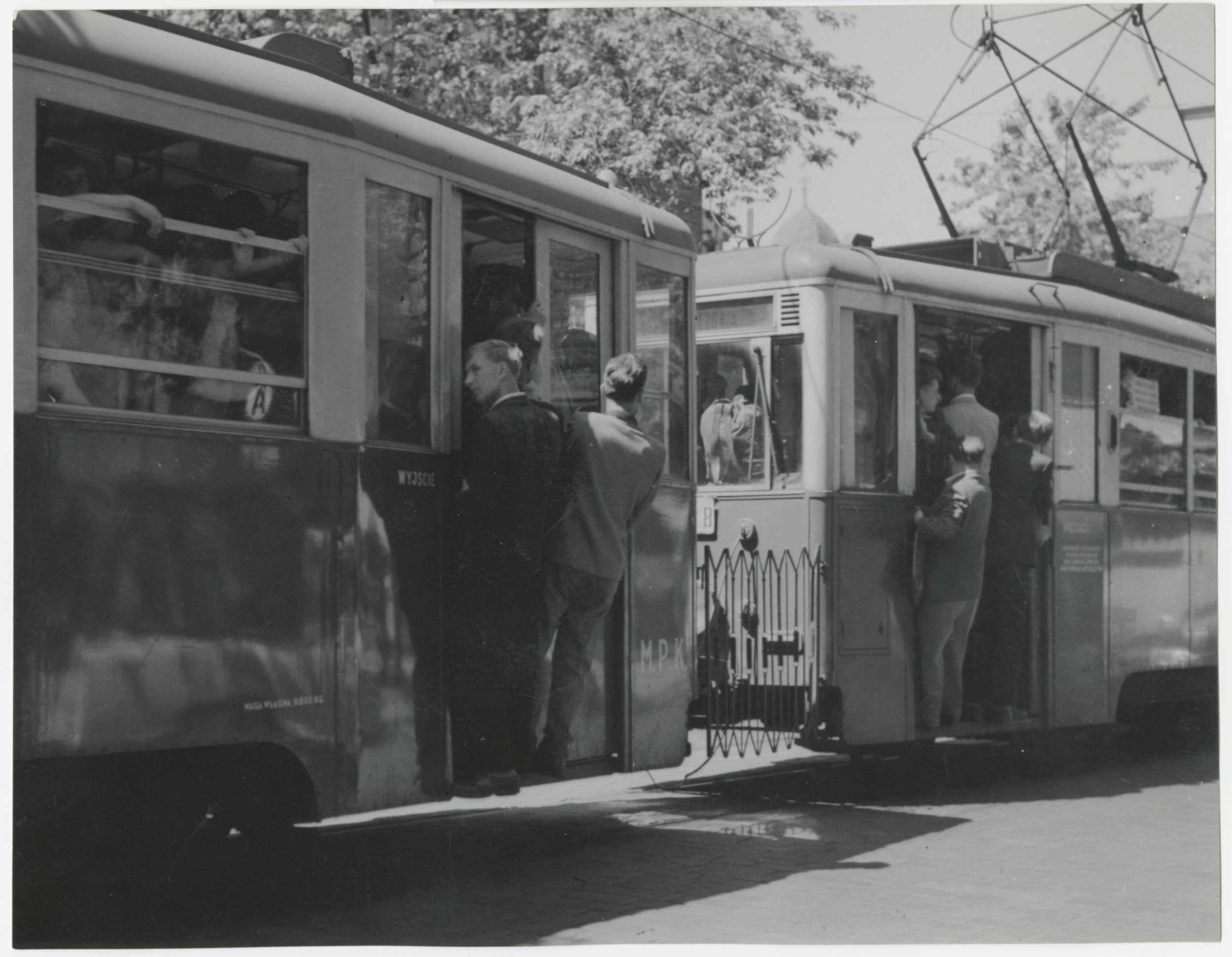 Fotografia Ignacego Płażewskiego przedstawiająca wypełniony pasażerami tramwaj typu Konstal. Tramwaje tego typu były pierwszymi tramwajami produkowanymi po II wojnie światowej w Polsce. Technologicznie nawiązywały do rozwiązań konstrukcyjnych niemieckich. Na zdjęciu widoczny jest fragment kopuły na kamienicy przy ulicy Piotrkowskiej 125. Na schodkach wejściowych stoją młodzi mężczyźni, którzy nie zmieścili się do środka.